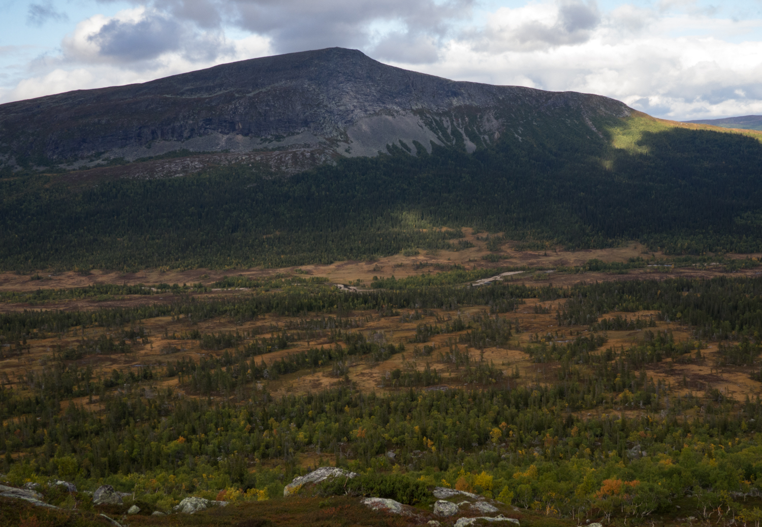 Fjället Juthatten och grubbdalens naturreservat